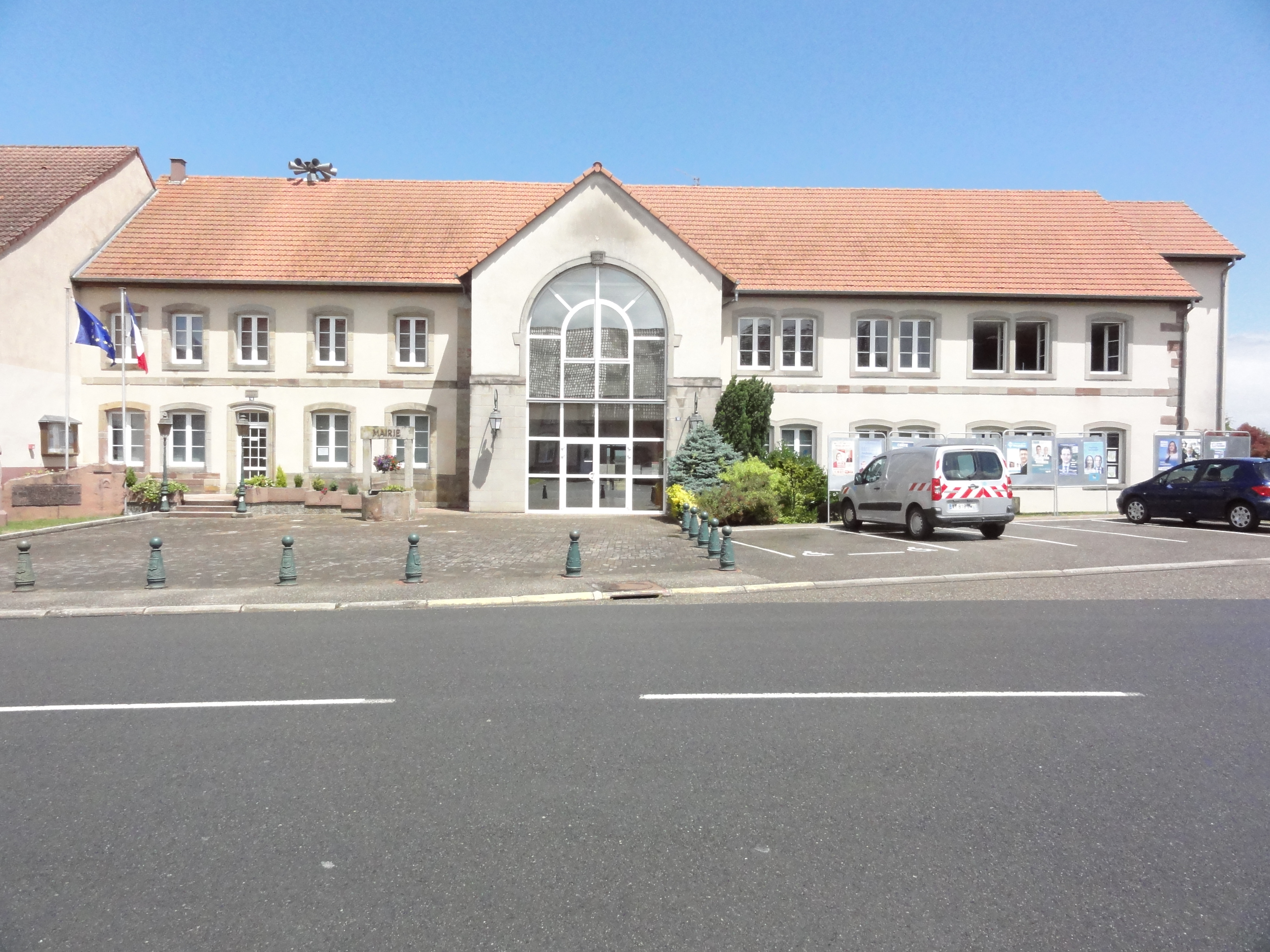 Mittelbronn (Moselle) mairie